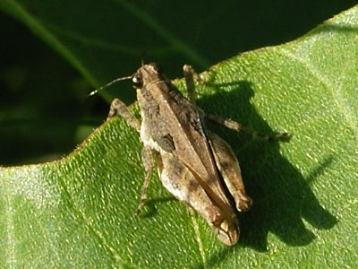 Tetrix japonica(ハラヒシバッタ)